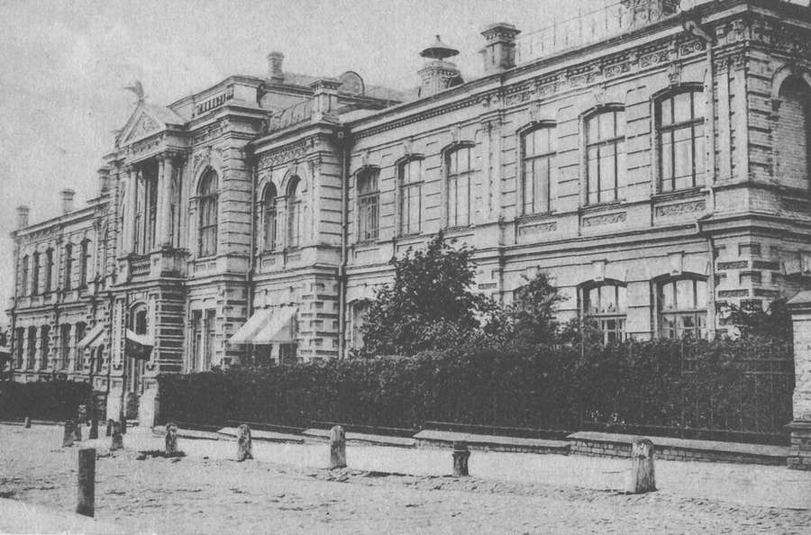 Вид Киевской 4-й гимназии в начале XX века.